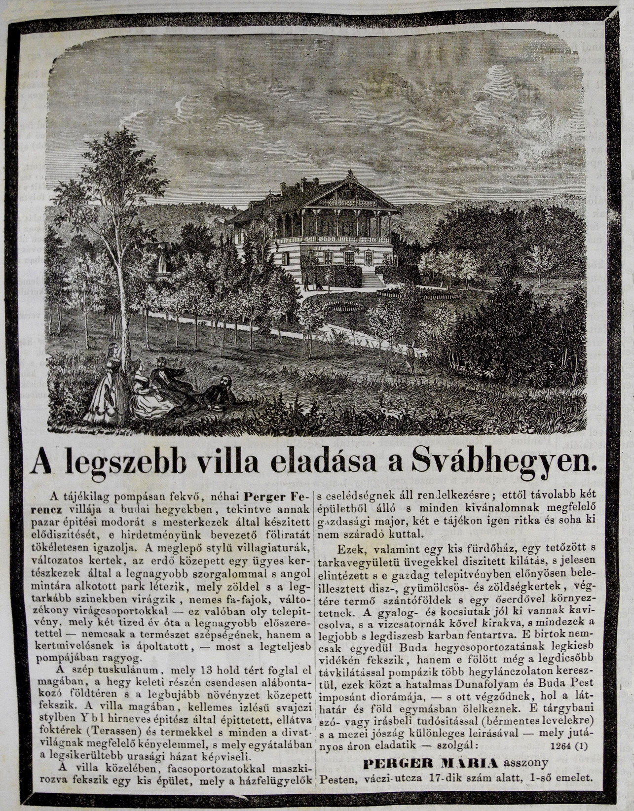 A Vasárnapi Ujsag 1865. évi 12. évfolyam 35. számában megjelent - Magyarországon talán az első - képes ingatlanhirdetés, amely a Perger-villáról (1125 Budapest, Béla király út 30) készült.